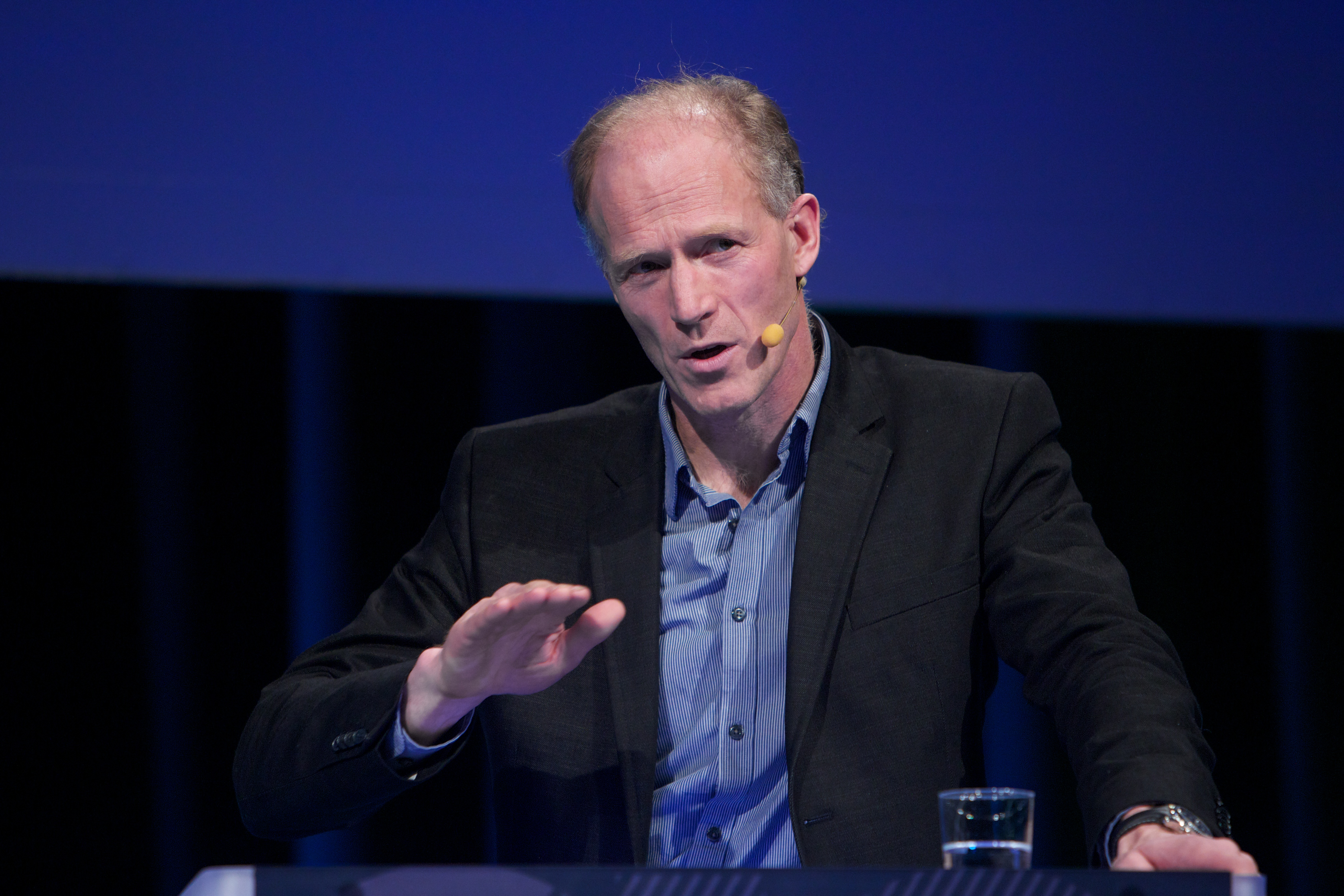 Børge Ousland. ZERO- konferansen arrangeres av den norske miljøstiftelsen Zero Emission Resource Organization (ZERO). Foto: Eirik Helland Urke